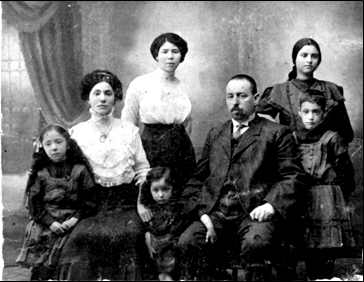 הרב שמואל בנימין רבה הראשי של פלובדיב ומייסד בית הספר העברי בעיר צולם ביוני 1911